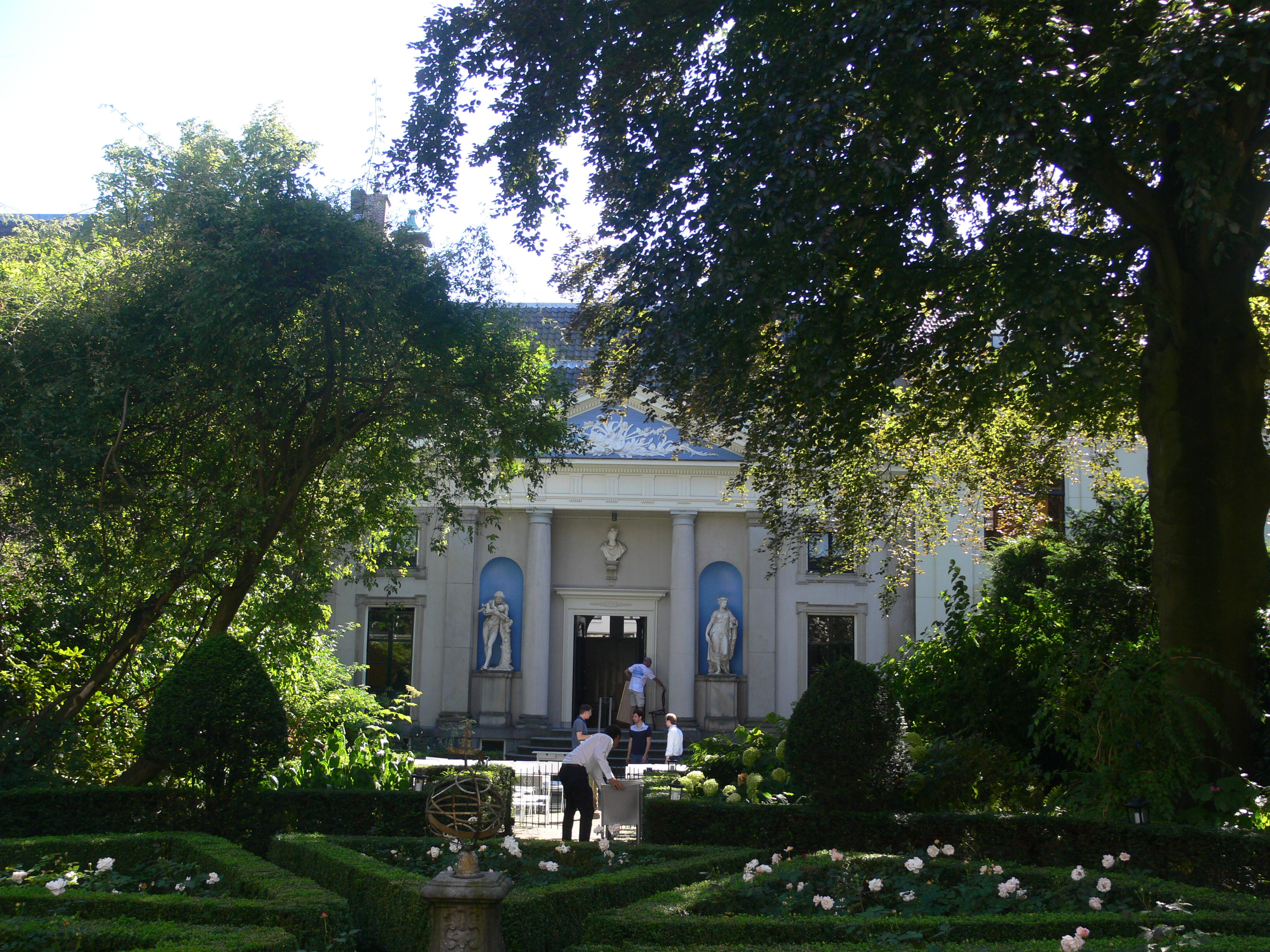 Amsterdam - Museum Van Loon